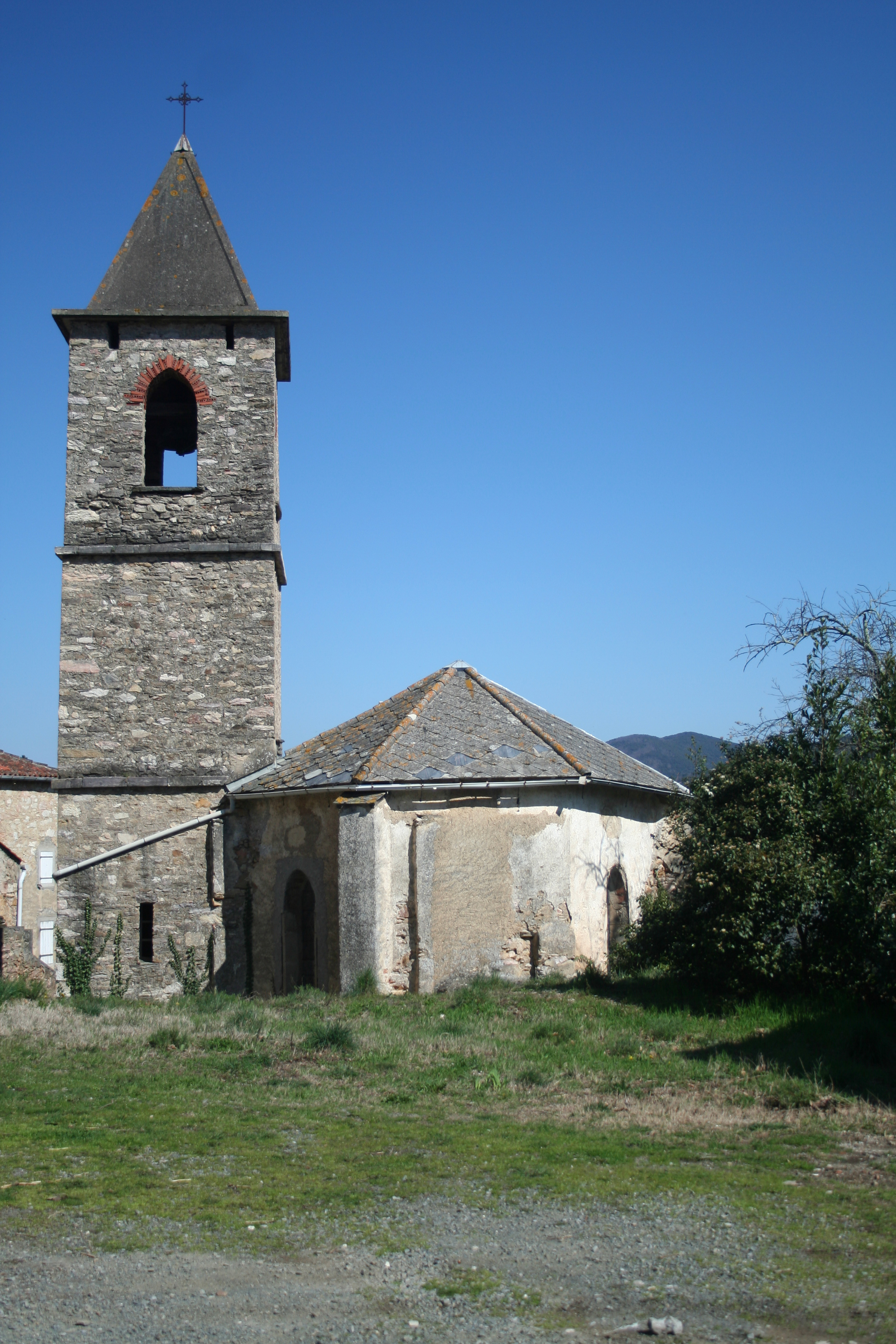 Riols (Hérault) - église de la Nativité-de-Notre-Dame d'Ardouane.